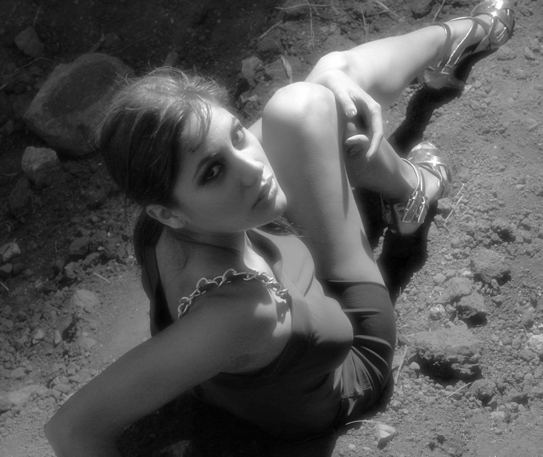 Thelma Rodriguez Miss Nicaragua 2008